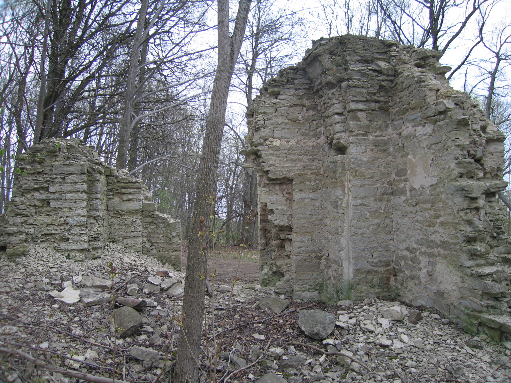 Vaade kabeli seest kalmistule.Foto: Robert Treufeldt, 01.05.2014